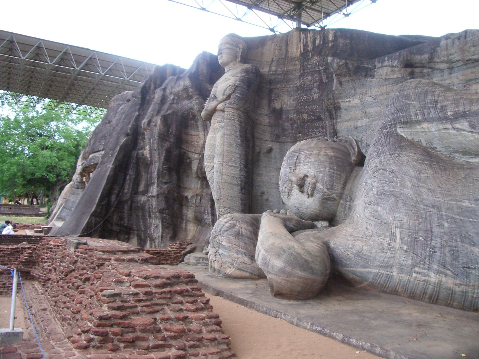 Els Budes del Gal Vihara, a Polonnaruwa, foto feta per J. Ollé el juliol del 2006